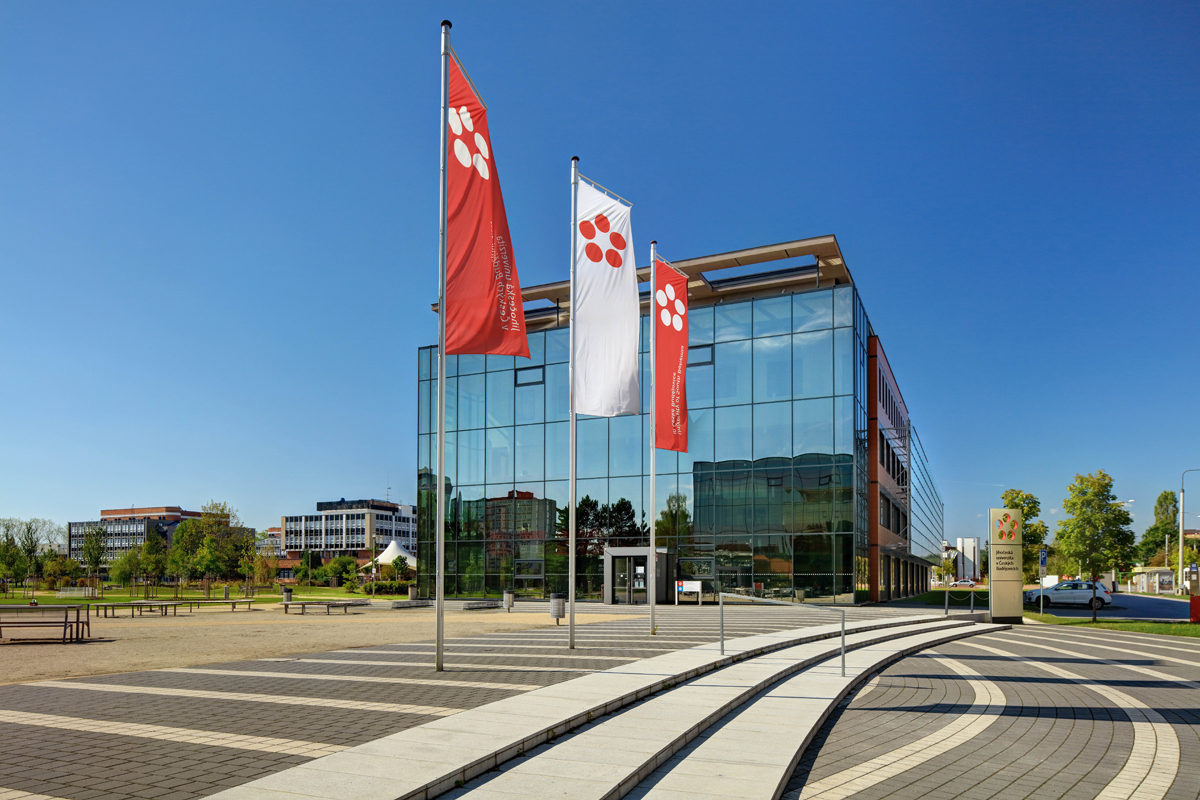 Jihočeská univerzita České Budějovice 2015 Libor Sváček